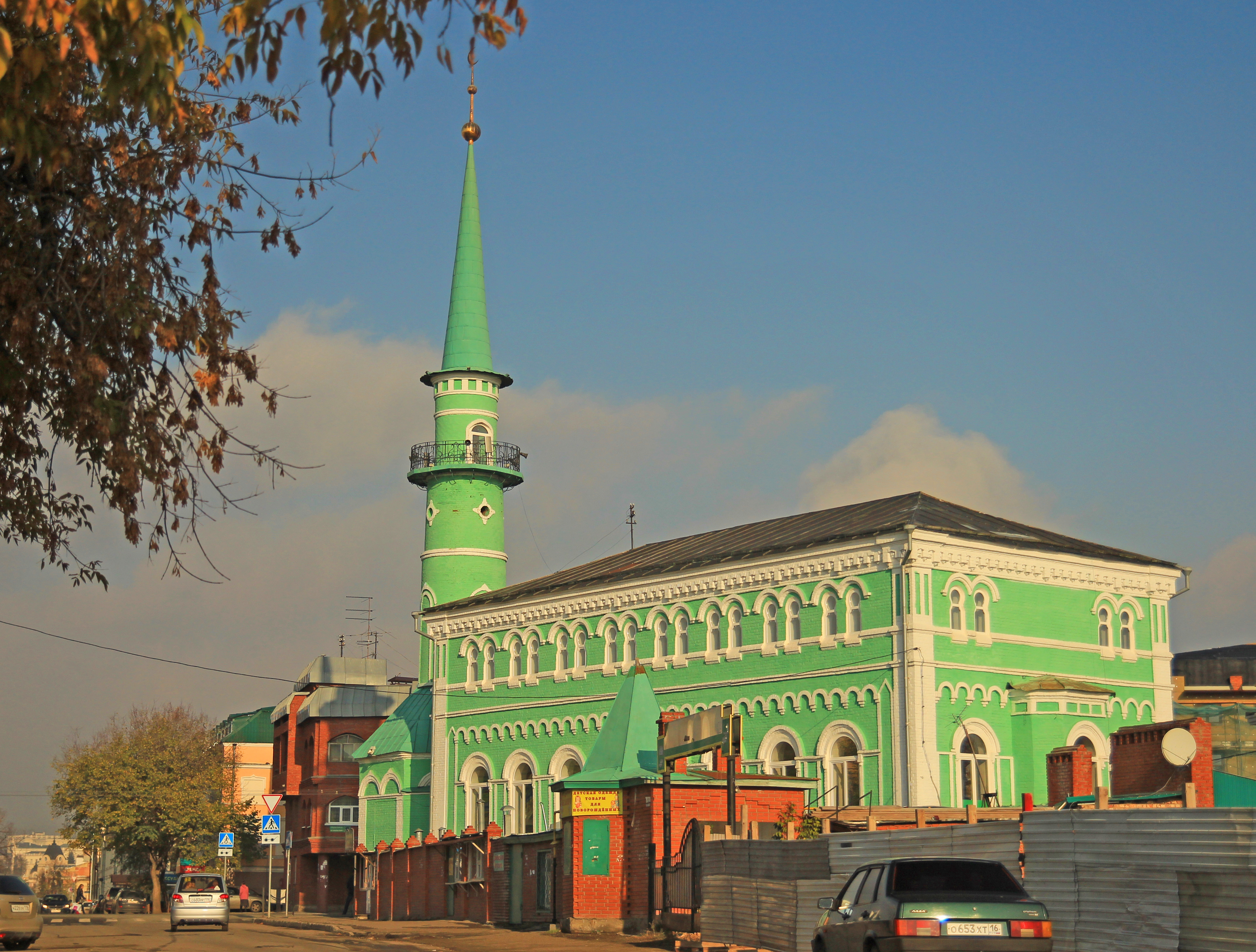 Здание султановской мечети (Республика Татарстан, Казань, тукаевская улица, 14/4)